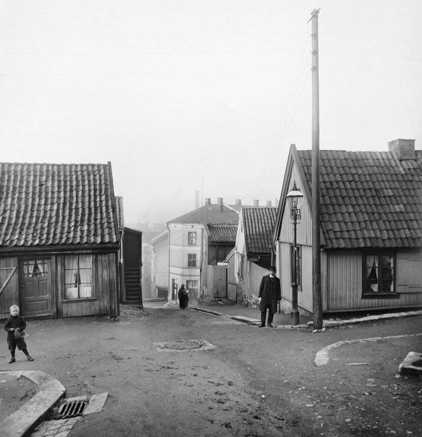 Johannesgata fra Stupinngata mot Sørligata. Foto: Anders Beer Wilse/Oslo Museum, 1916.